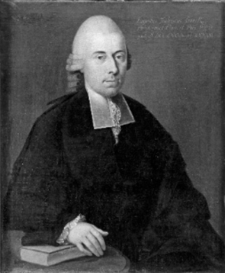 Augustus Fridericus Boeck, Öl auf Leinwand, 79 × 64 cm, Tübinger Professorengalerie